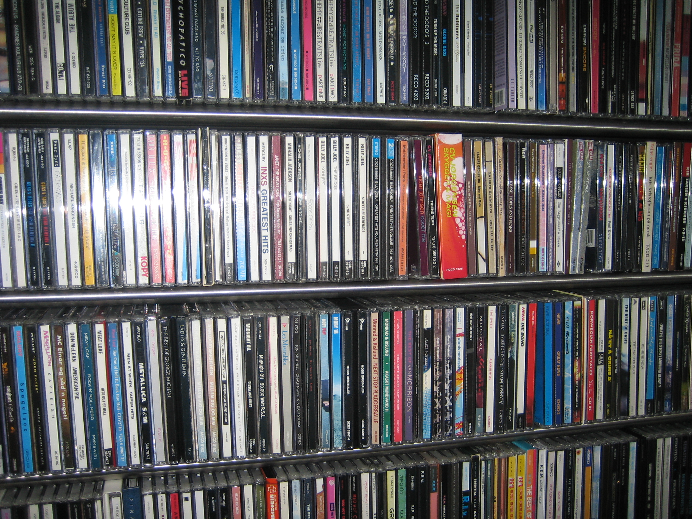 Sørens CD-samling.CD-hylle